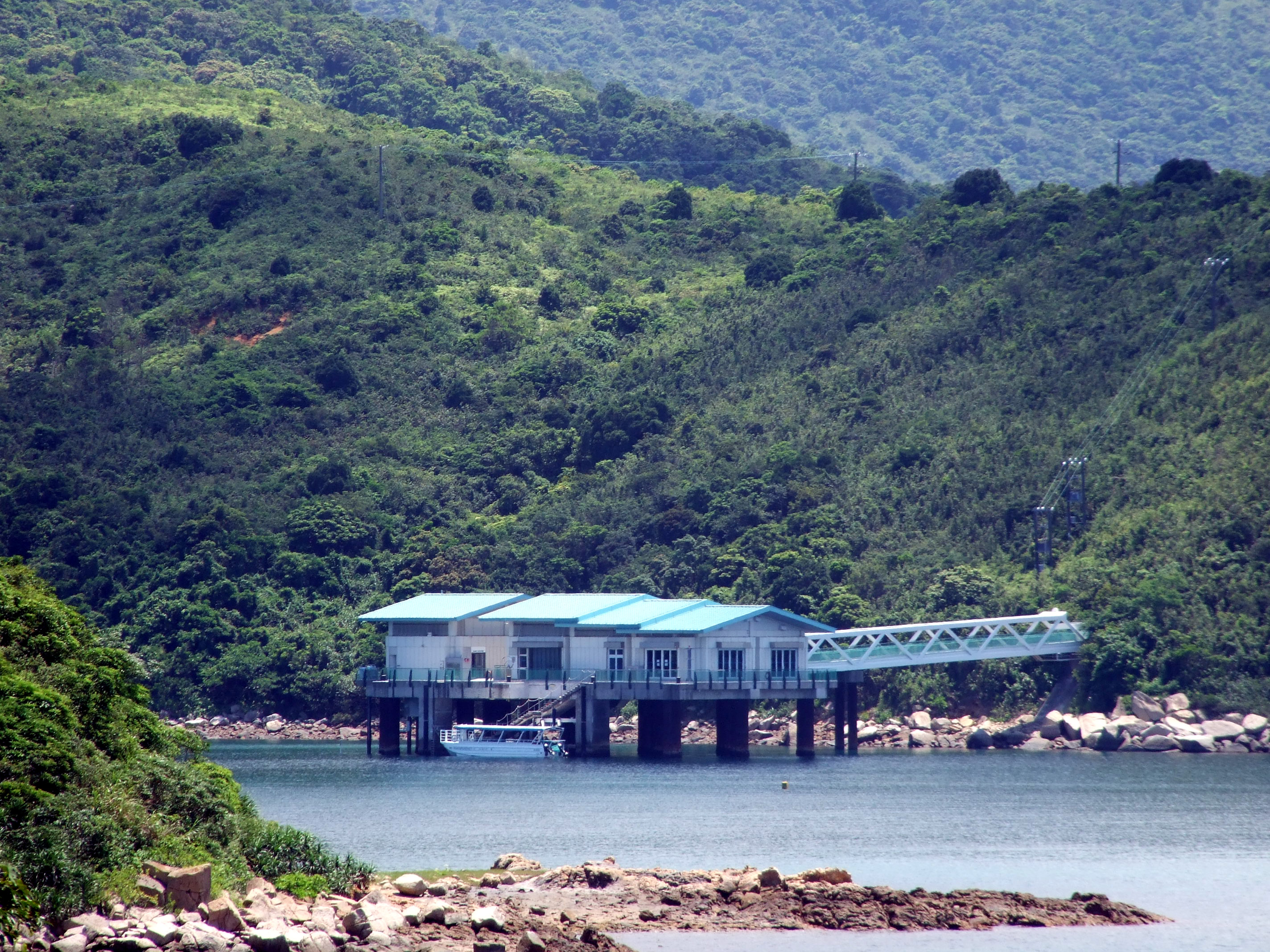 世界自然基金会海下灣海洋生物中心